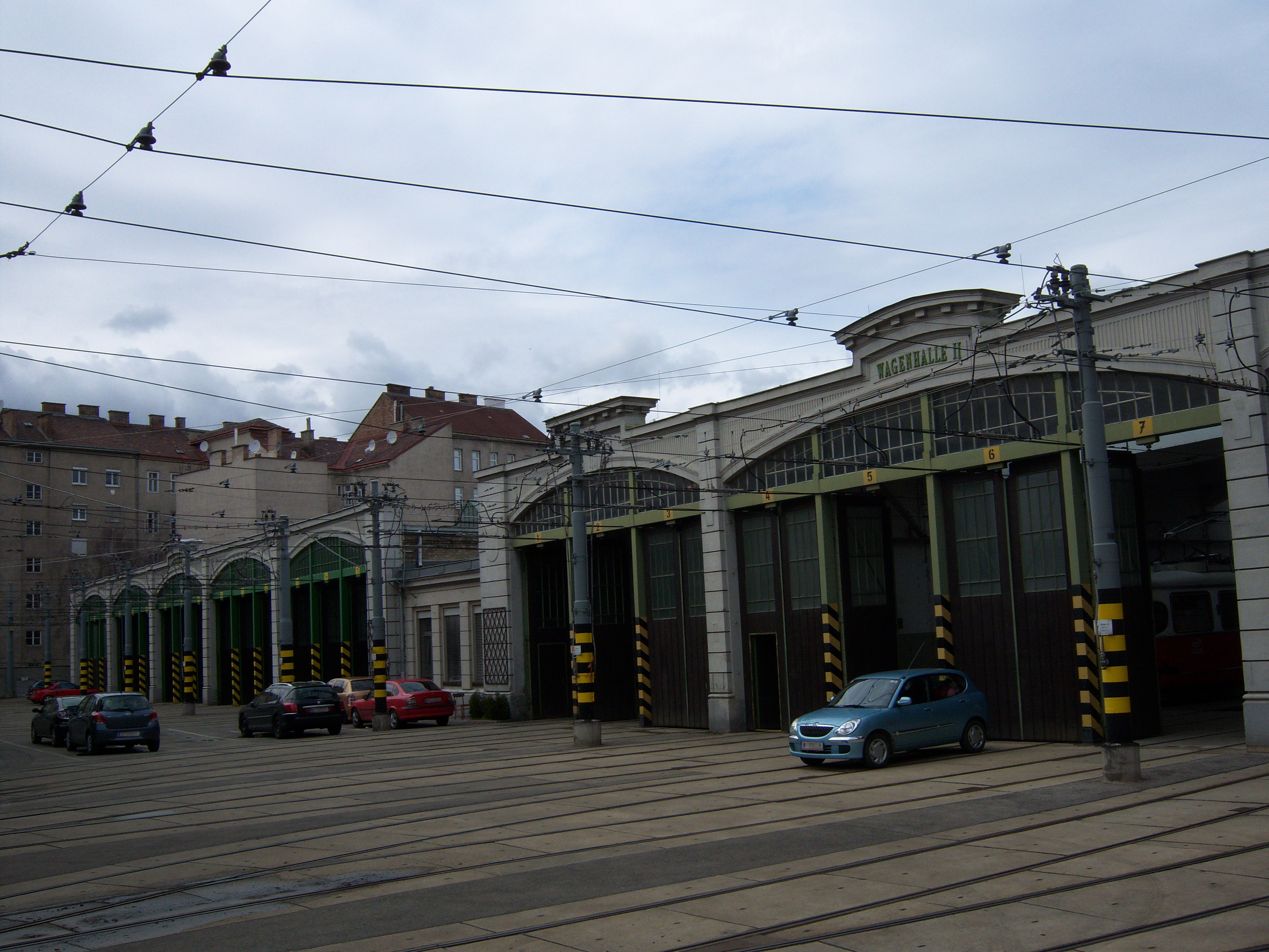 Betriebsbahnhof Brigittenau